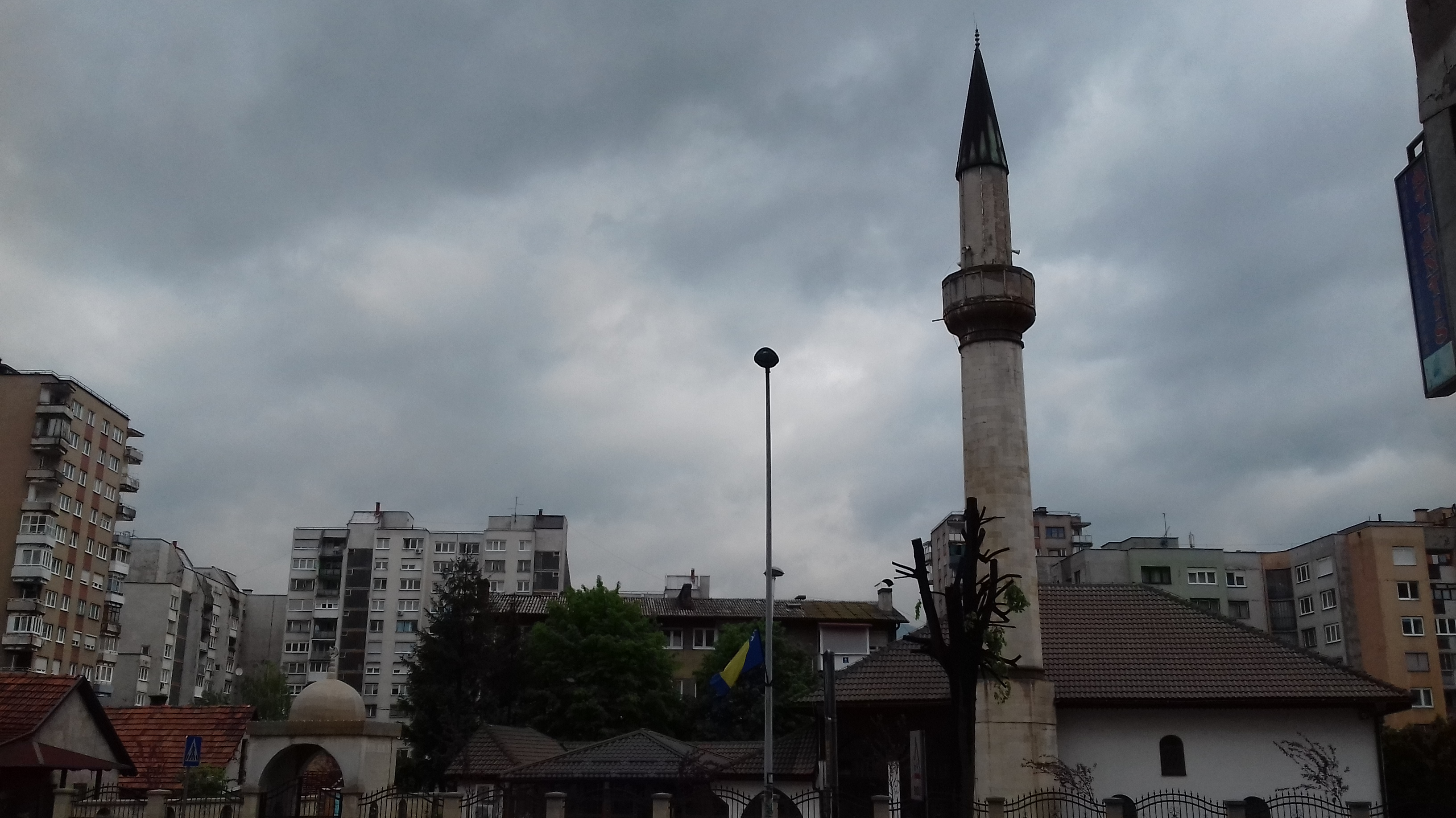 Сејменска џамија